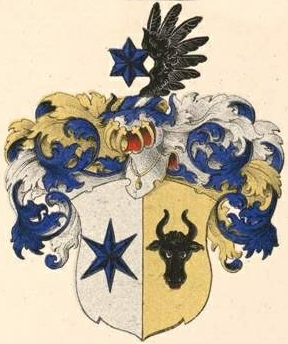 Samson von Himmelstierna suguvõsa aadlivapp